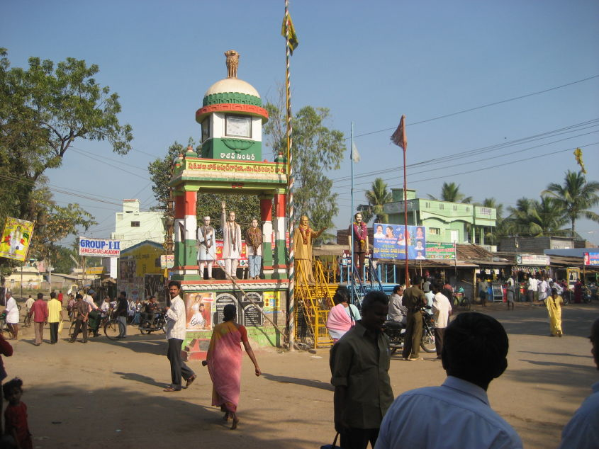 Parchuru, Prakasam District, Andhra Pradesh, Main centre పర్చూరు బొమ్మల సెంటరు. చీరాల, ఇంకొల్లు, చిలకలూరిపేట,గుంటూరు రోడ్లు కలిసే ప్రదేశము